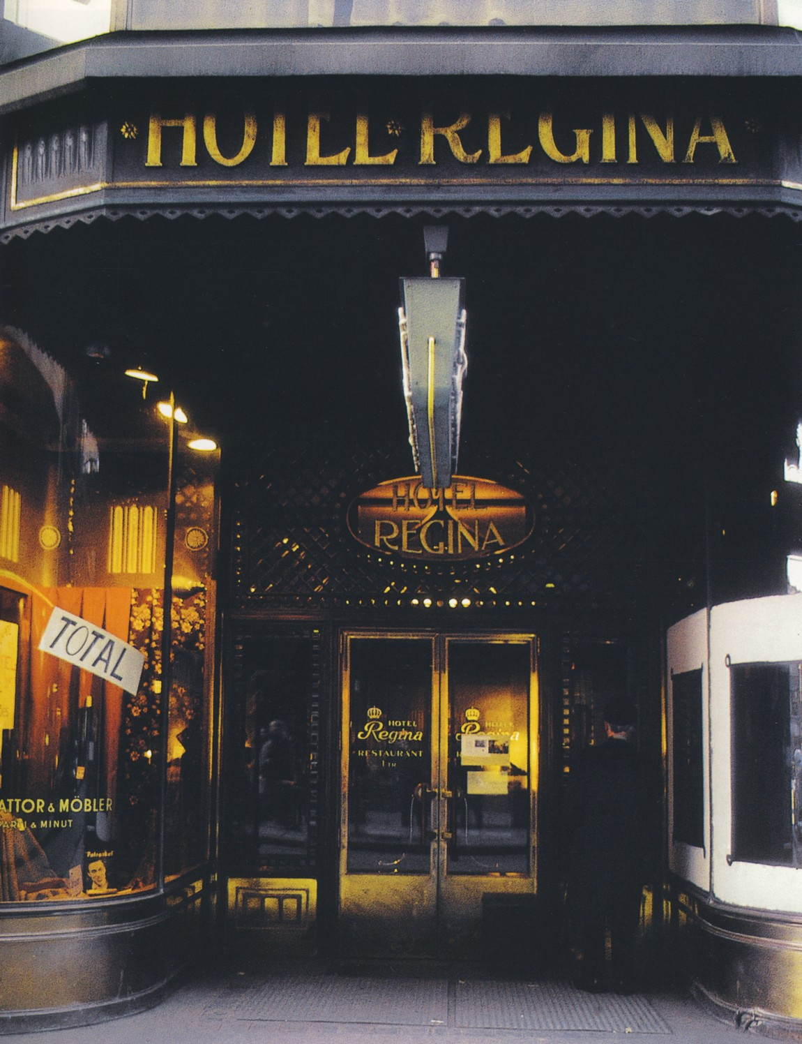 "Hotel Regina", Drottninggatan 42 i Stockholm (numera riven)